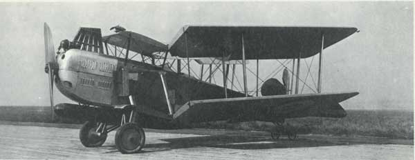 Premier appareil livré à la marine française.